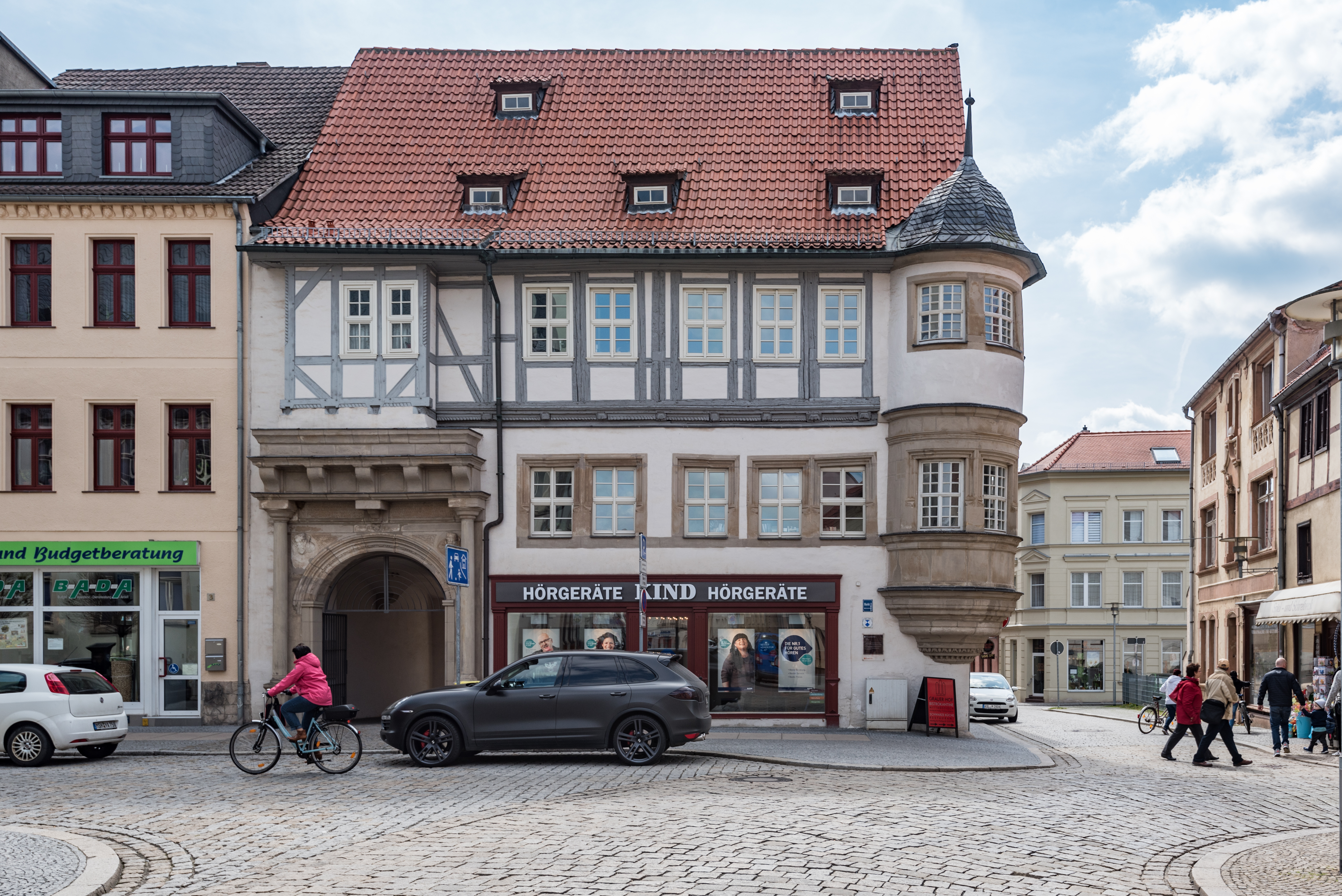 Aschersleben, Markt 2